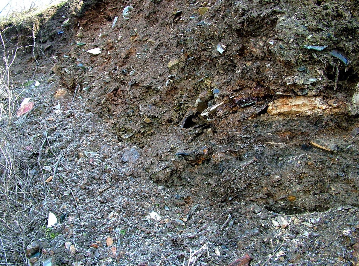 Cséry-dombok rétegződése (Budapest XVIII. kerület Cséry-telep)